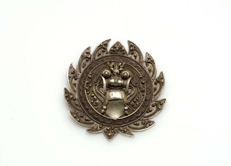 Broche. Mogelijk gemaakt voor Europese vrouwen.. Zilveren broche voorstellende een Bhoma monsterkop